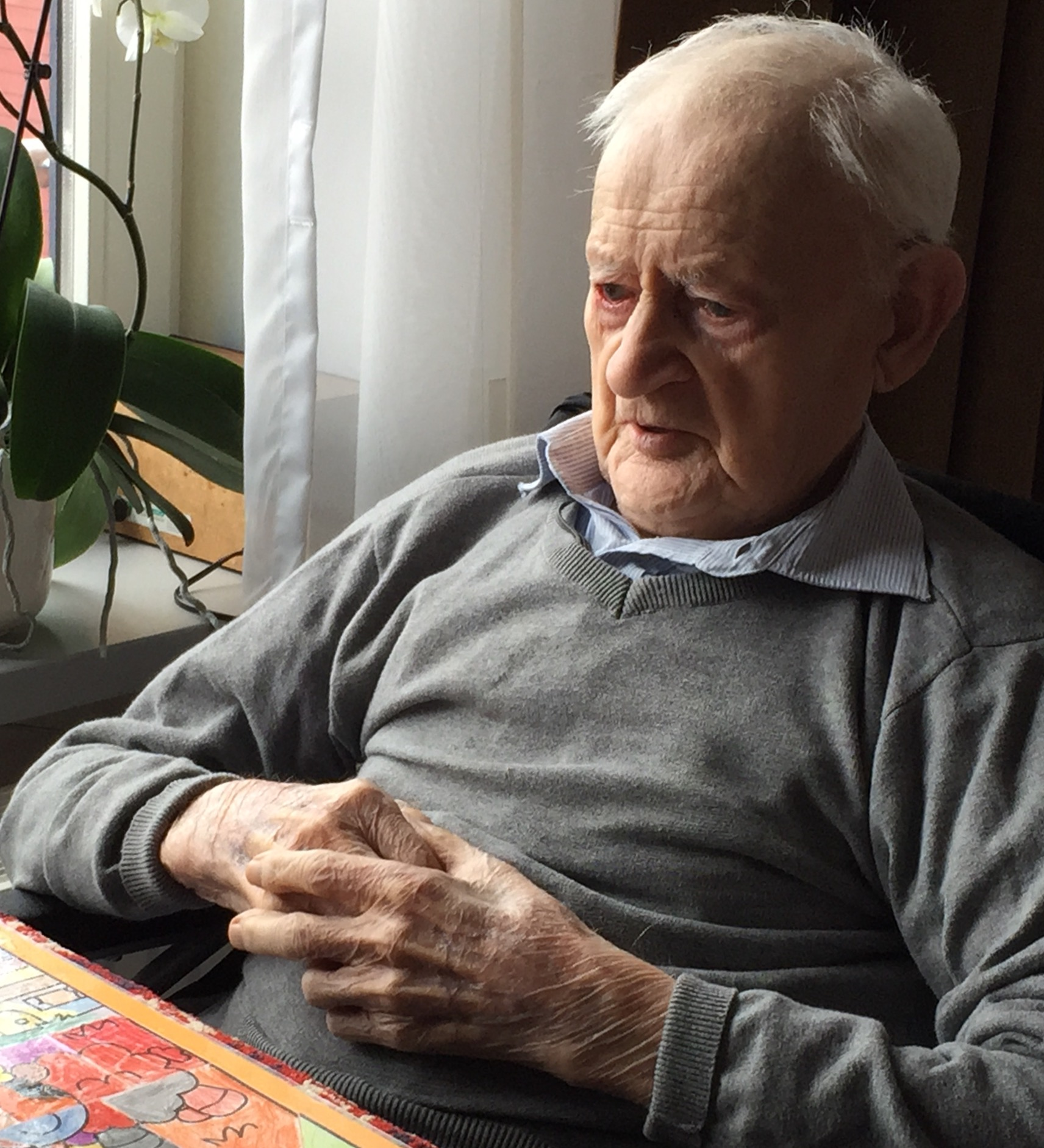 Jan Willem van de Kamp, 106 years old